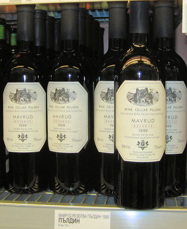 Mavrud wine for sale in a supermarket in Plovdiv, Bulgaria